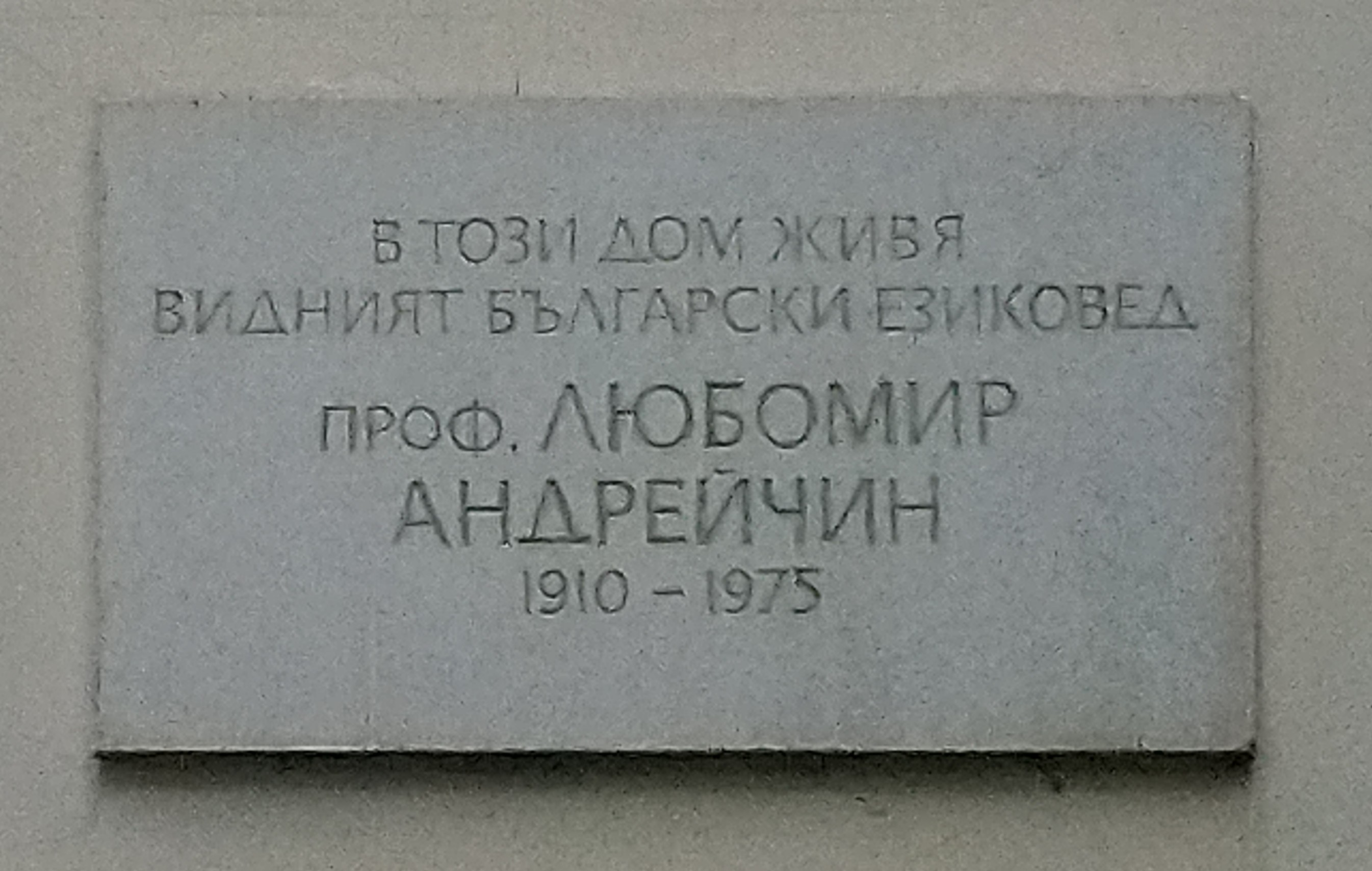 Паметна плоча на езиковеда Любомир Андрейчин, ул. Цанко Церковски 13, София